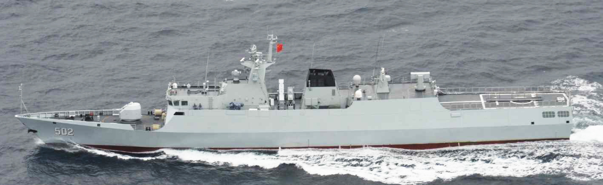 ８月１４日（月）午後４時頃、海上自衛隊第３ミサイル艇隊所属「おおたか」（佐世保）及び第４航空群所属「Ｐ－１」、「Ｐ－３Ｃ」（厚木）が、上対馬の北東１００ｋｍの海域を南西進する中国海軍ジャンダオ級小型フリゲート１隻を確認した。 その後、当該艦艇が対馬海峡を南下し、東シナ海に向けて航行したことを確認した。 なお、当該艦艇は、７月２３日（日）に対馬海峡を北上した艦艇と同一である。